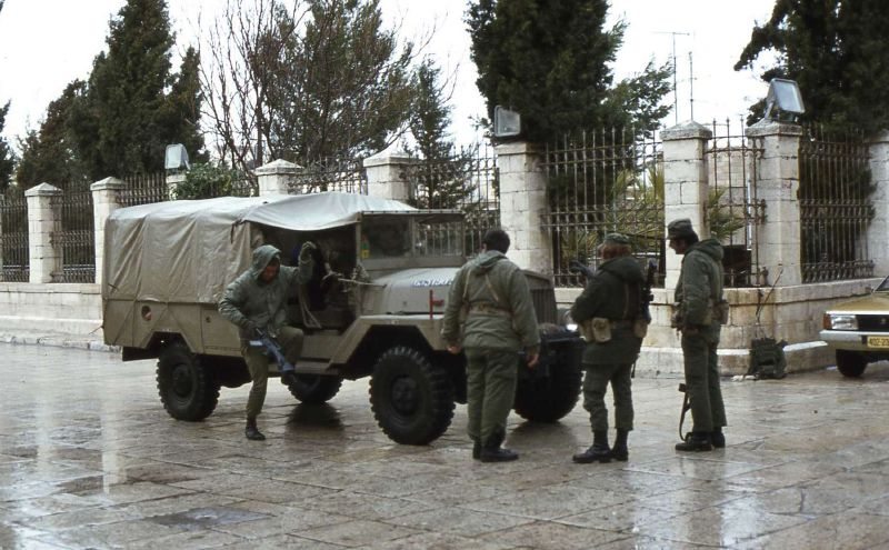 Soldiers in Bethlehem, 1978.